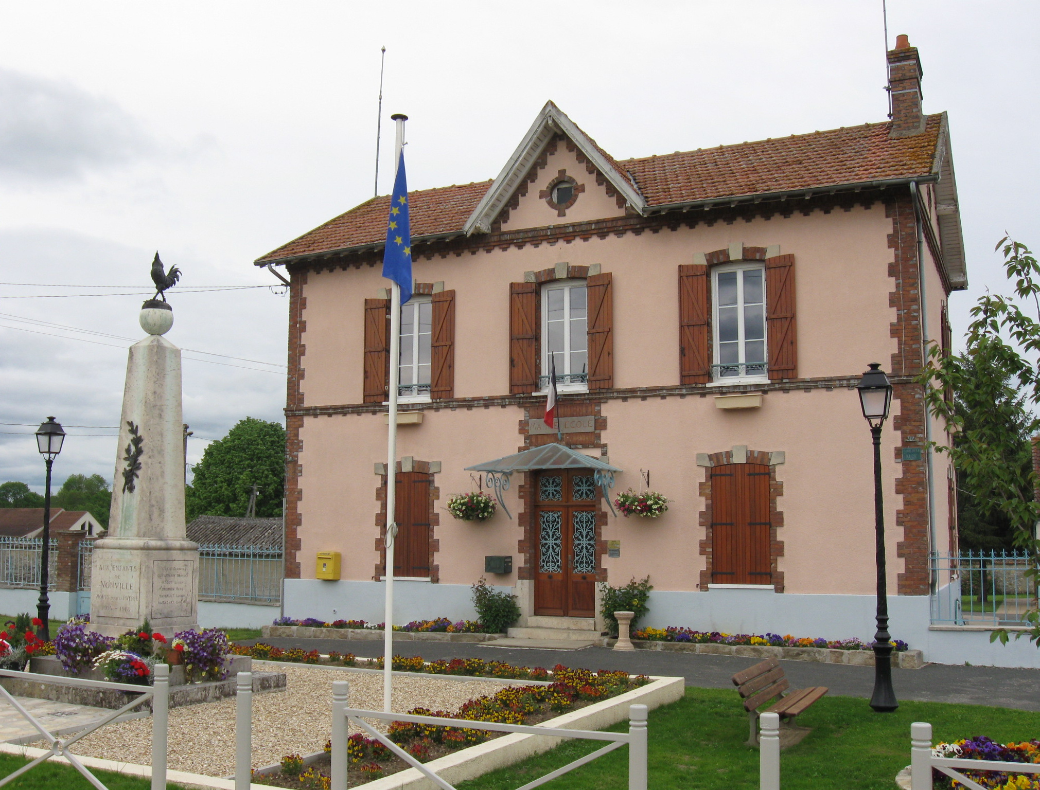 Mairie-école de Nonville. (département de la Seine et Marne, région Île-de-France).